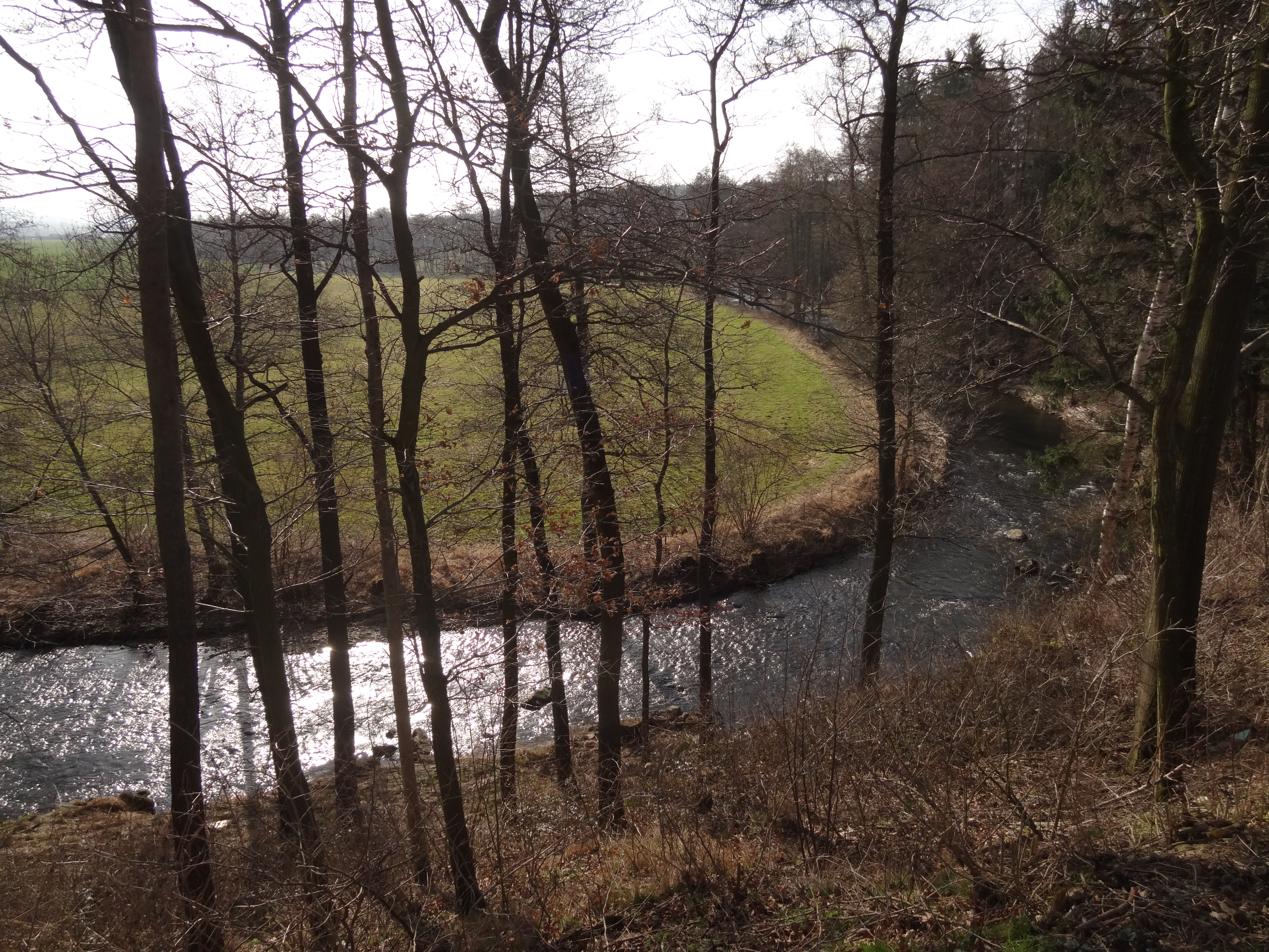 Vestecká Lhotka - řeka Doubrava